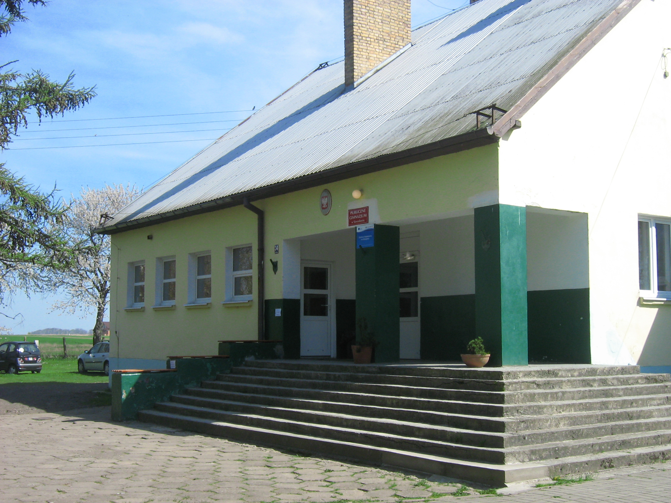 Gimnazjum w Sierosławiu